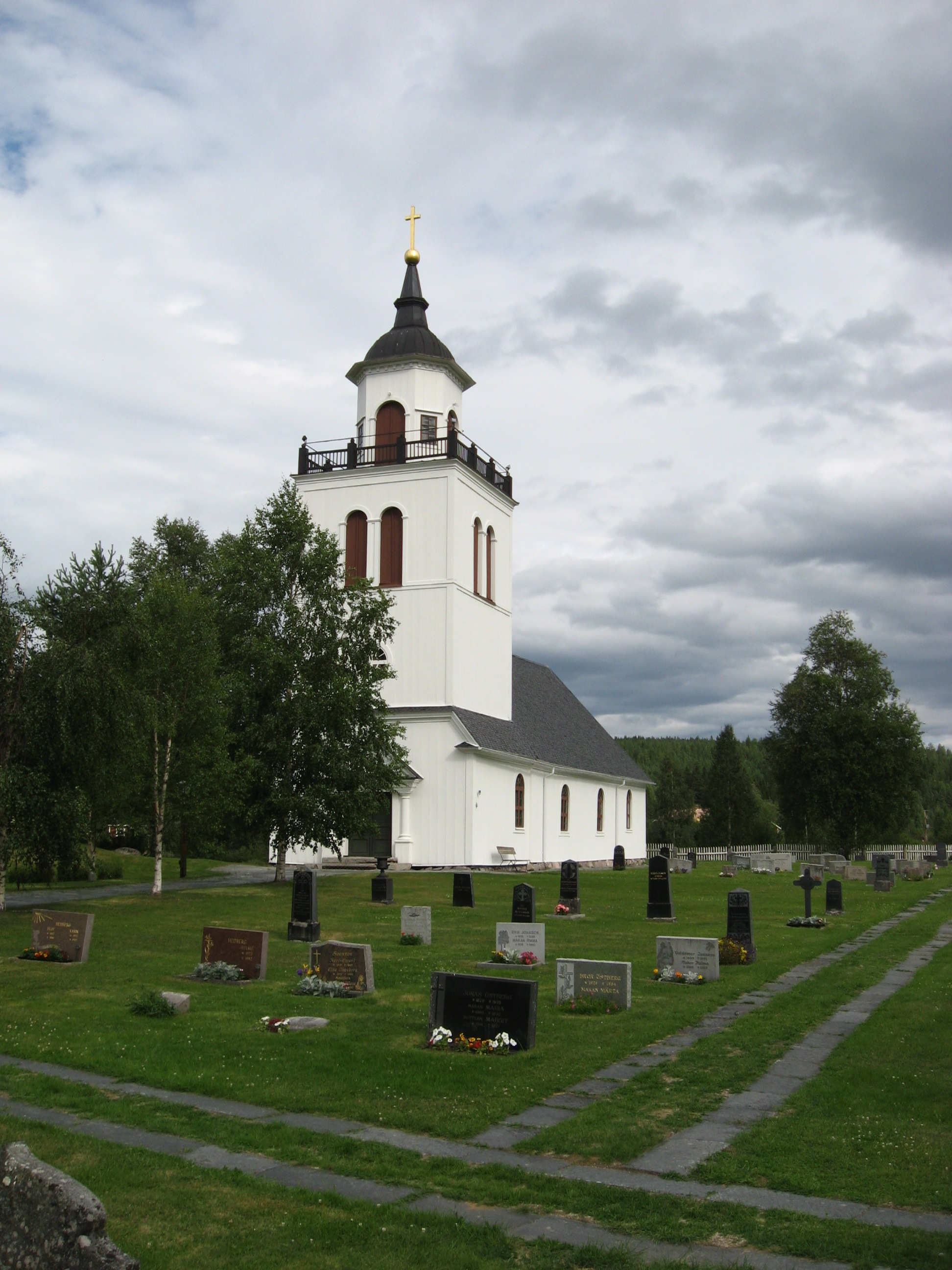 Överhogdal kerk met kerhof